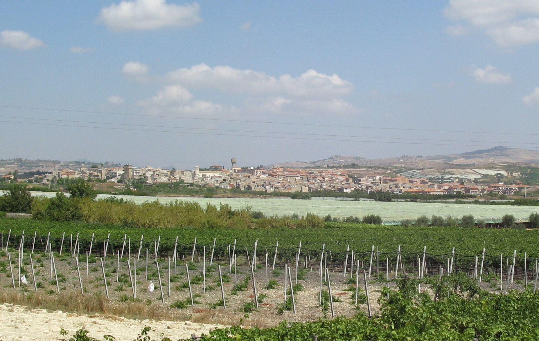 Panorama di Castrofilippo.